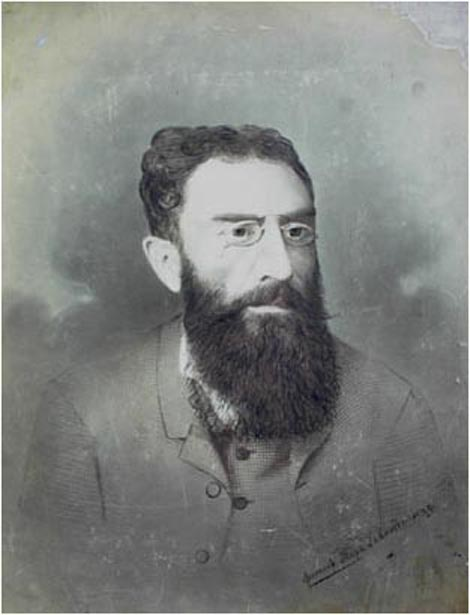 Армянский публицист, писатель и критик Григор Арцруни (1845—1892)